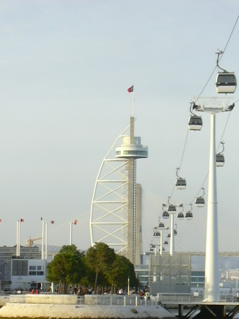 Parque das Nações, Lisboa. (WikiOlissipo 2006)